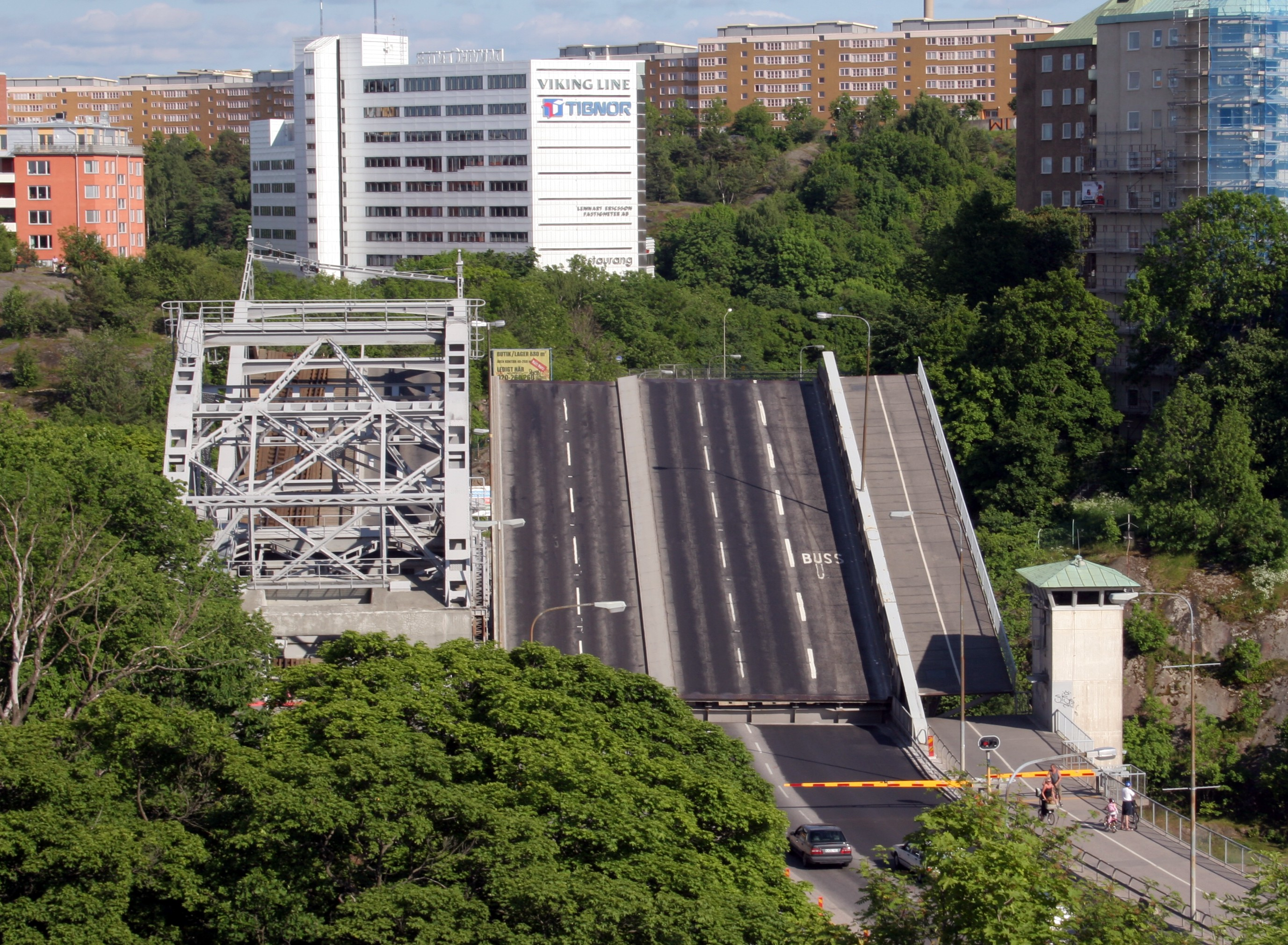 Danvikstullsbron in Stockholm opened. Picture taken from café Fåfängan.